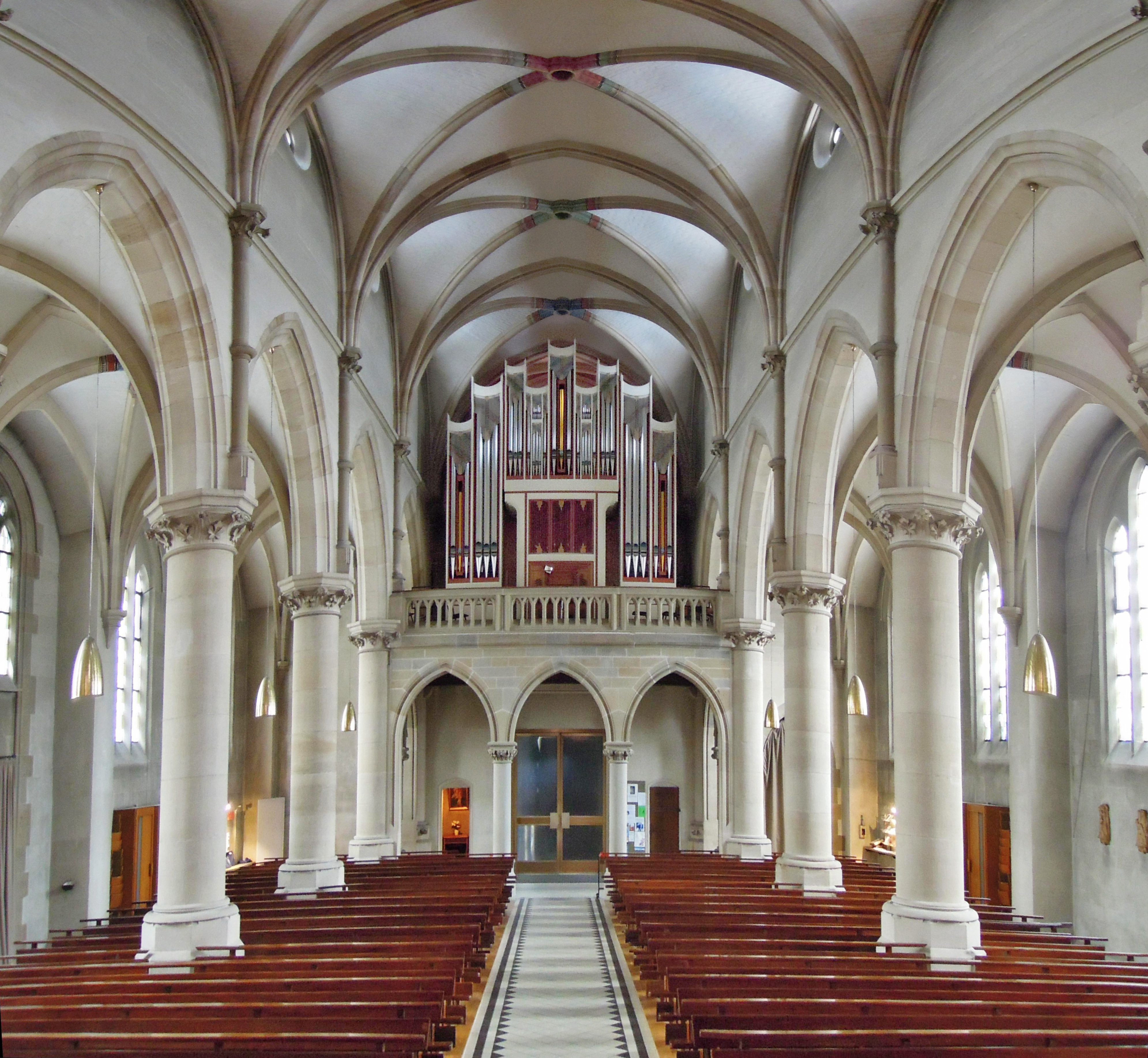 Blick auf Portal und Empore mit Rieger-Orgel